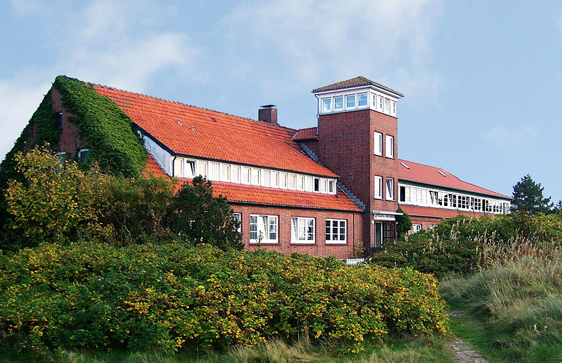 Nordseeinsel Spiekeroog. Hermann-Lietz-Schule (Internatsgymnasium in freier Trägerschaft)